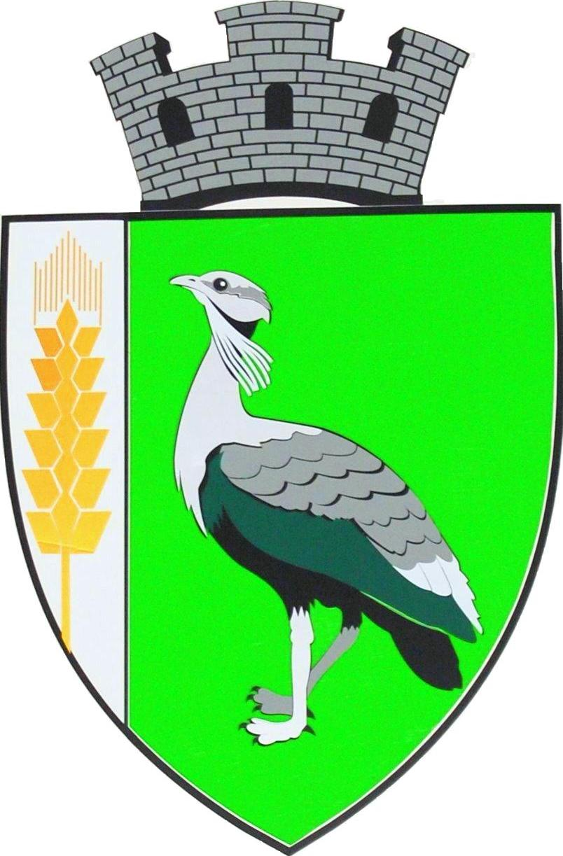 Stema orașului Drochia